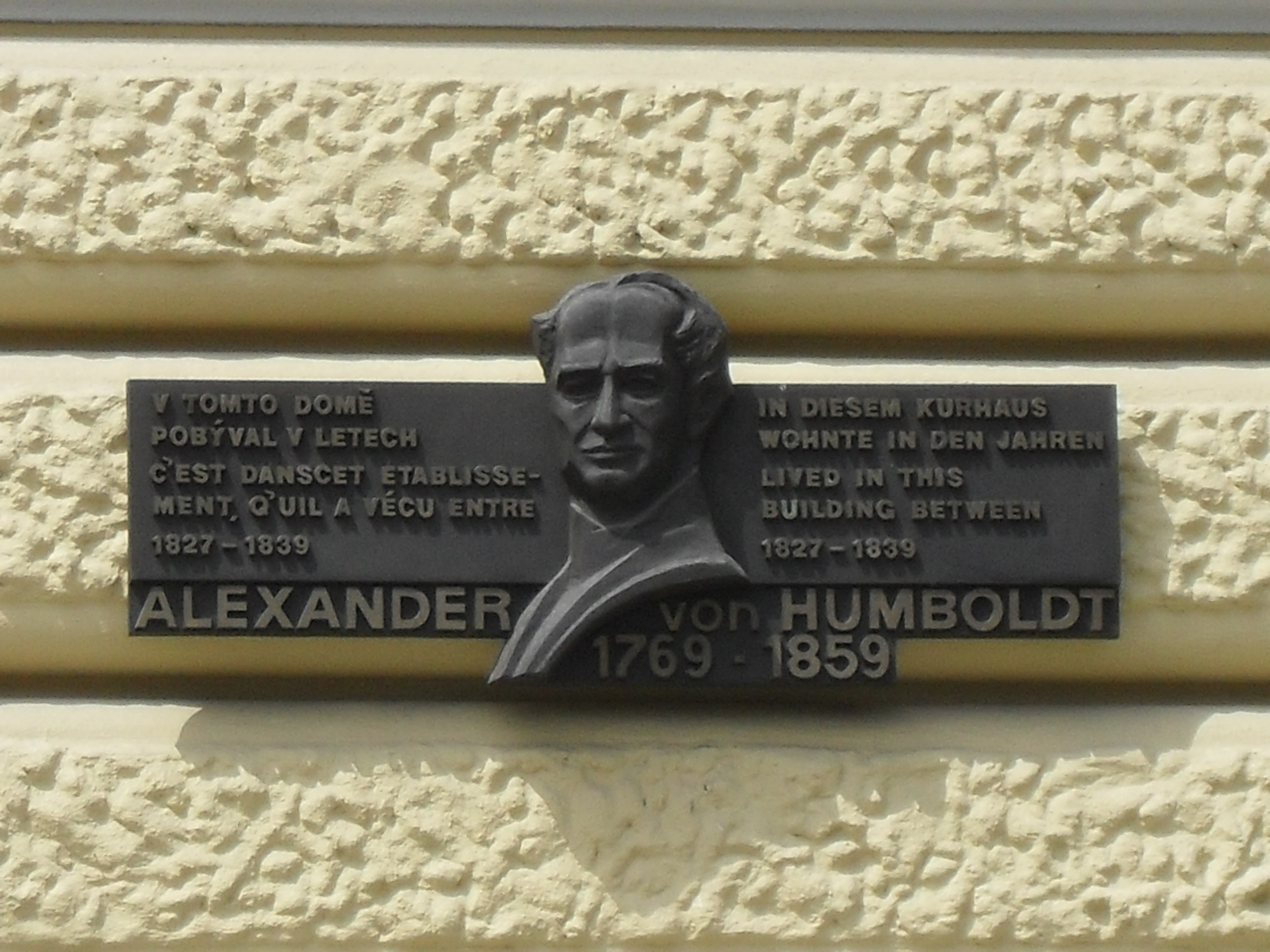 Tato plaketa je na LD Beethoven.